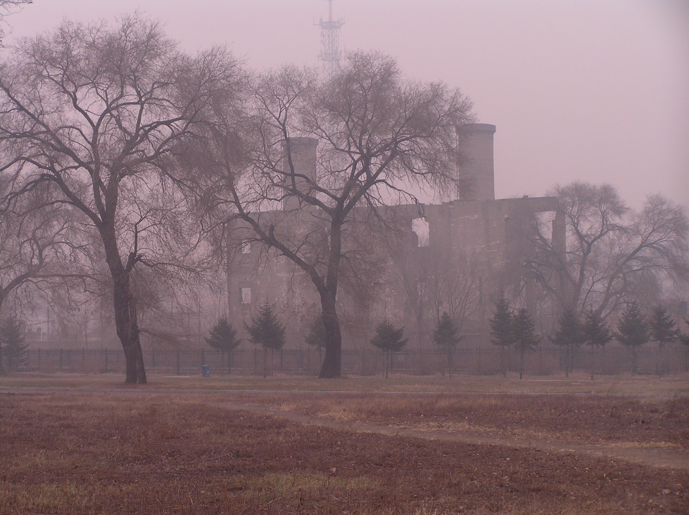 Building on the site of the Harbin bioweapon facility of Unit 731 関東軍防疫給水部本部731部隊（石井部隊） 日軍第731部隊旧址